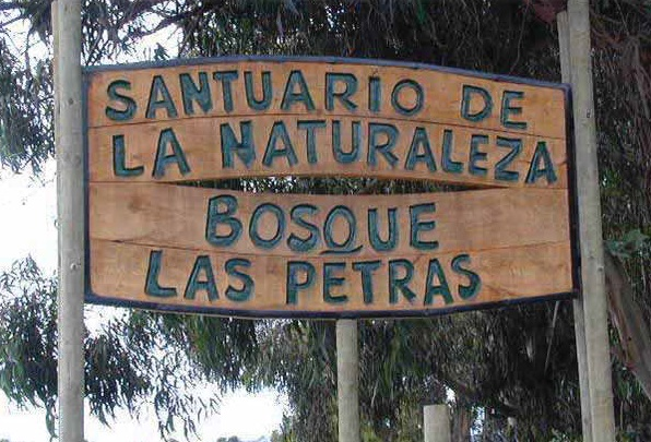 Santuario Bosque Las Petras Quintero, Chile